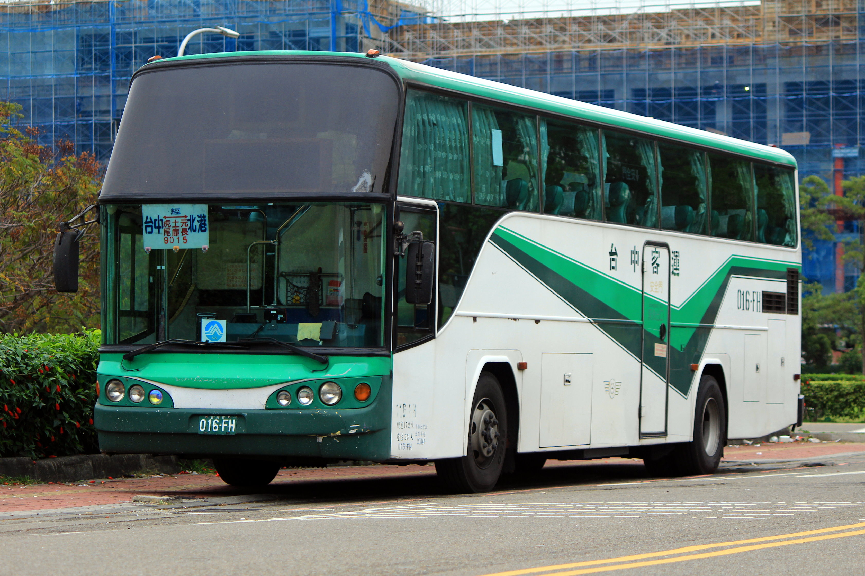 中文（台灣）: 干城空地休息中....